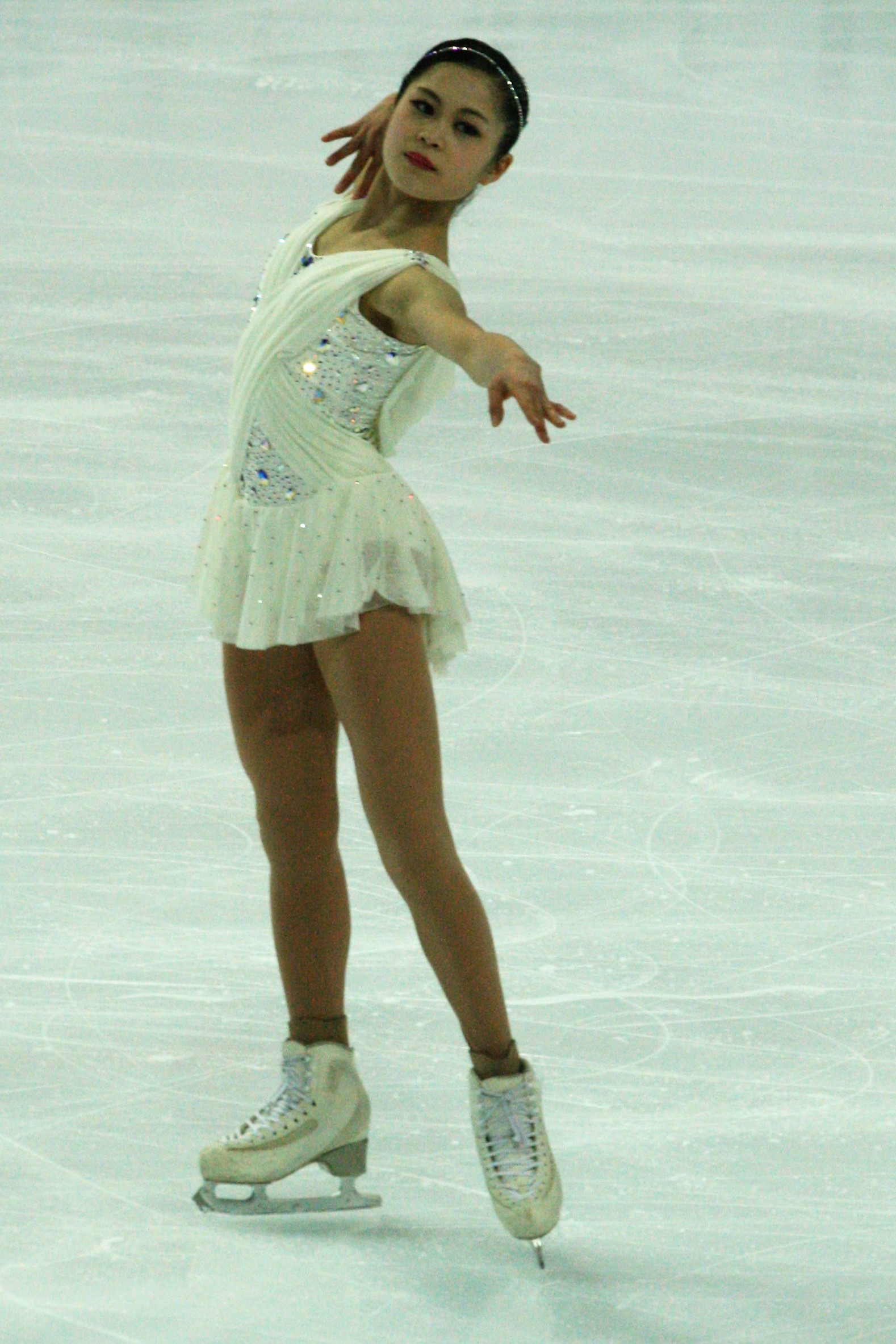 Сатоко Мияхара (Япония) на финале Гран-при по фигурному катанию 2016-2017